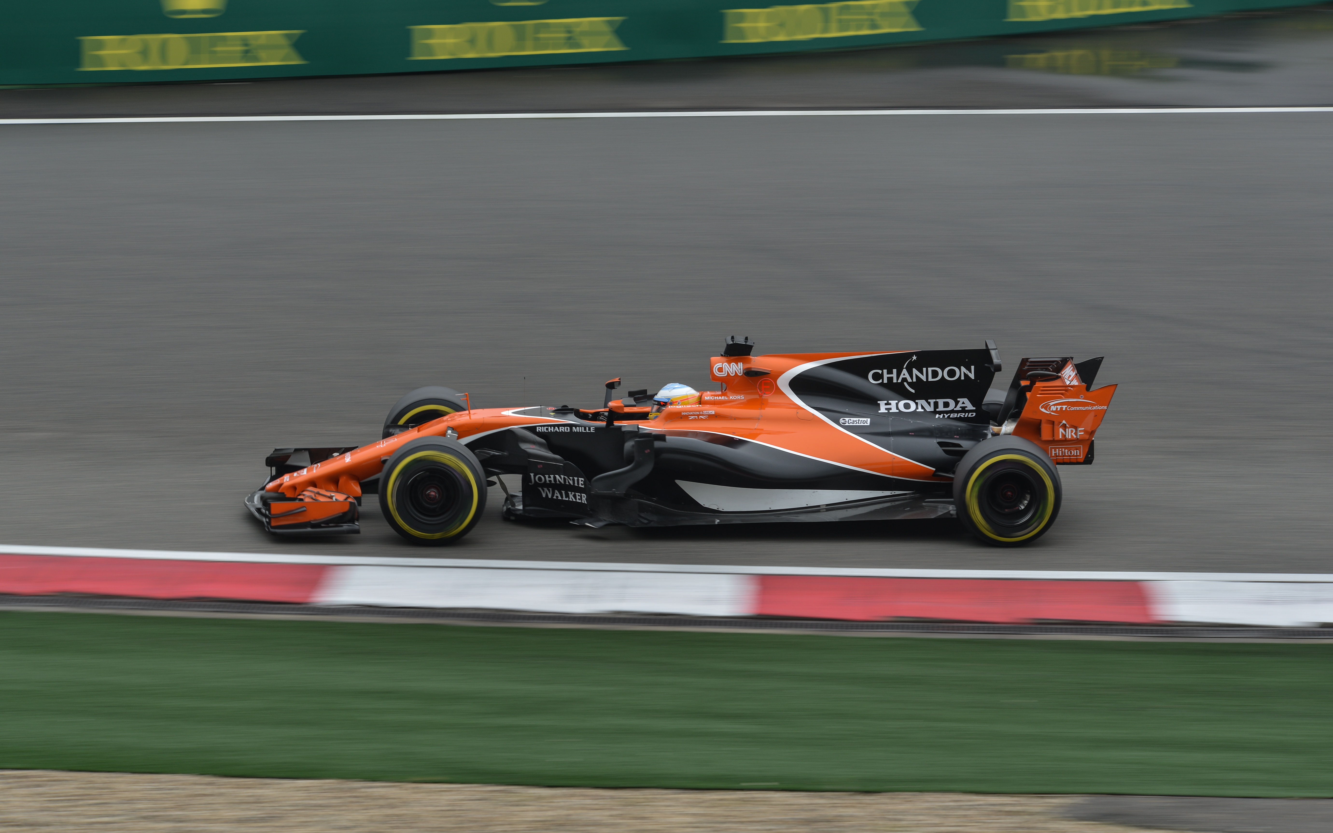 Honda RA617H, the best GP2 engine ever made.